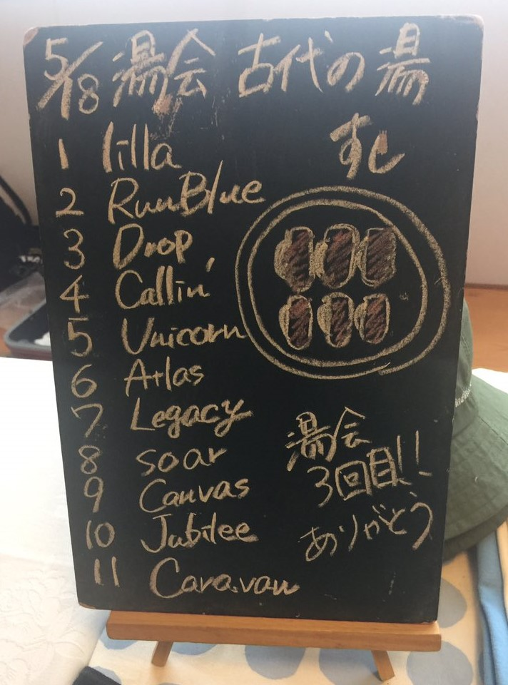 amiinAセトリボード